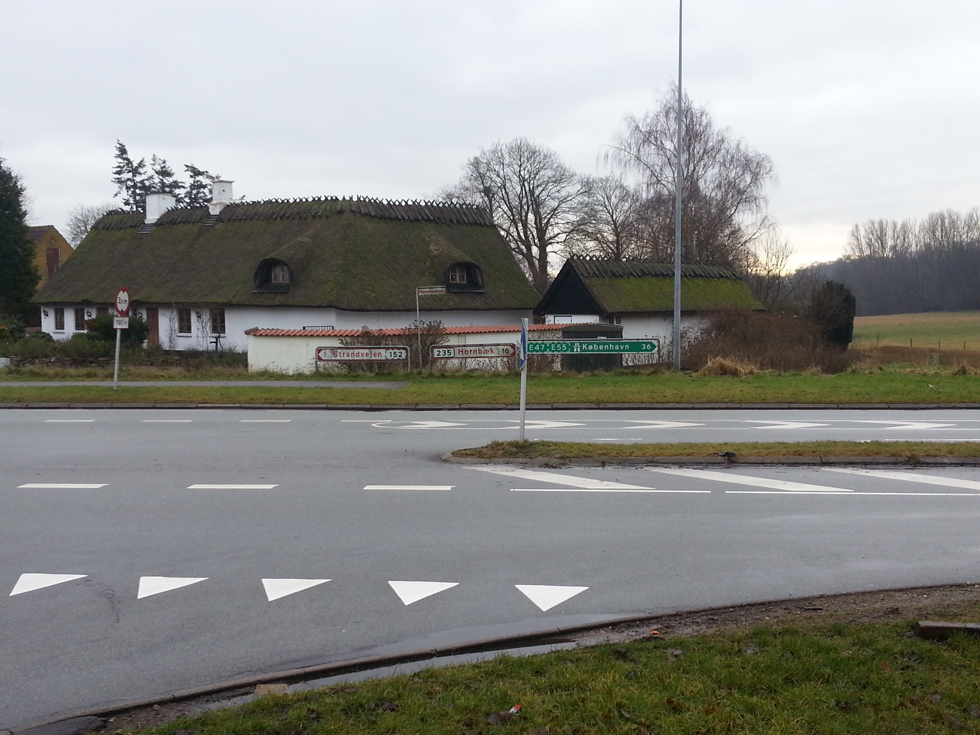 Hovvejs udmunding i Hornbækvej. Udsigt mod Tibberup